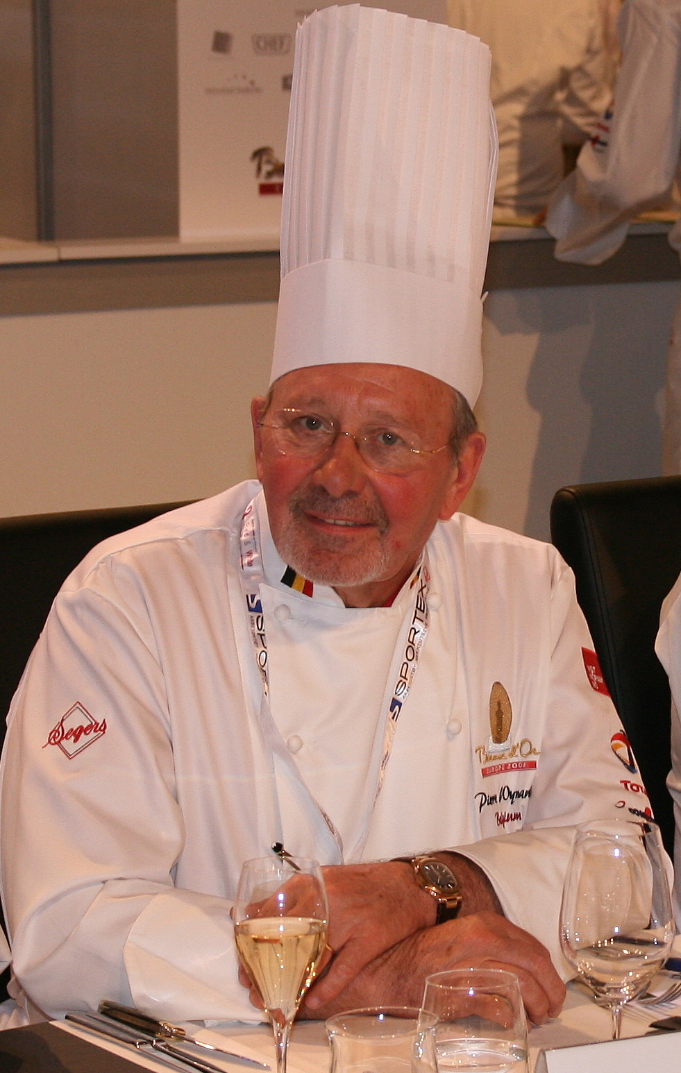 Pierre Wynants, Belgian chef